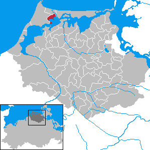 Wieck a. Darß in Mecklenburg-Vorpommern - District Nordvorpommern